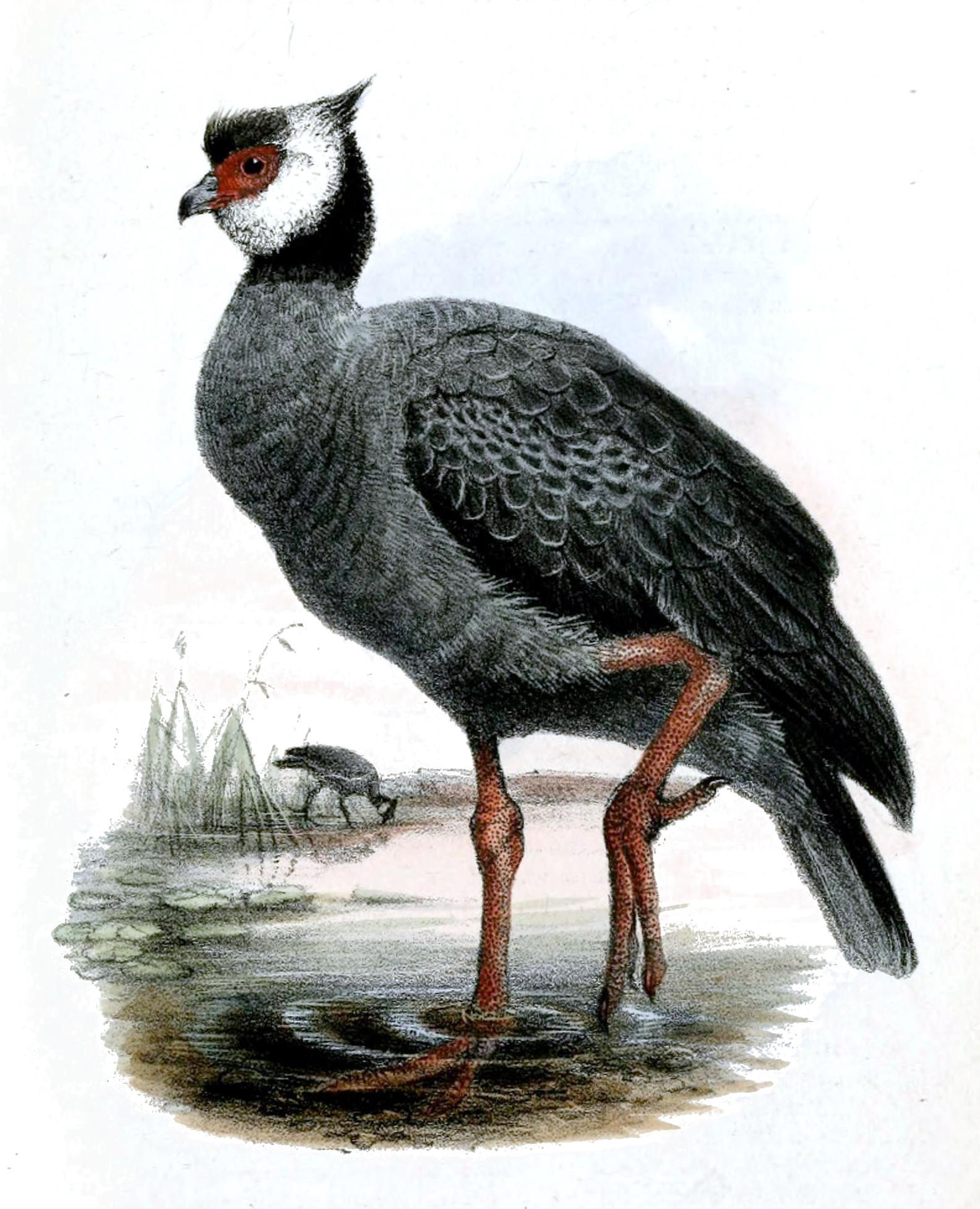 Chauna nigricollis = C. chavaria